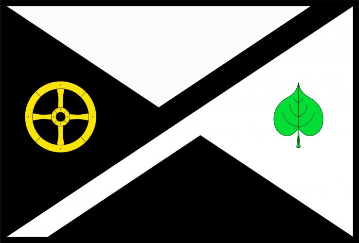 vlajka, Obytce, okres Klatovy